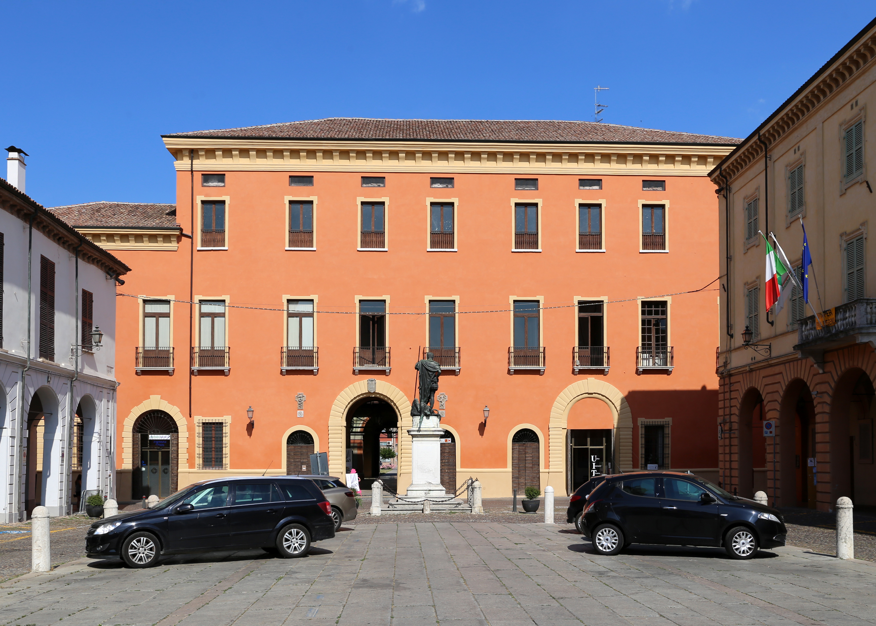 Palazzo Ducale (Guastalla) This is a photo of a monument which is part of cultural heritage of Italy.